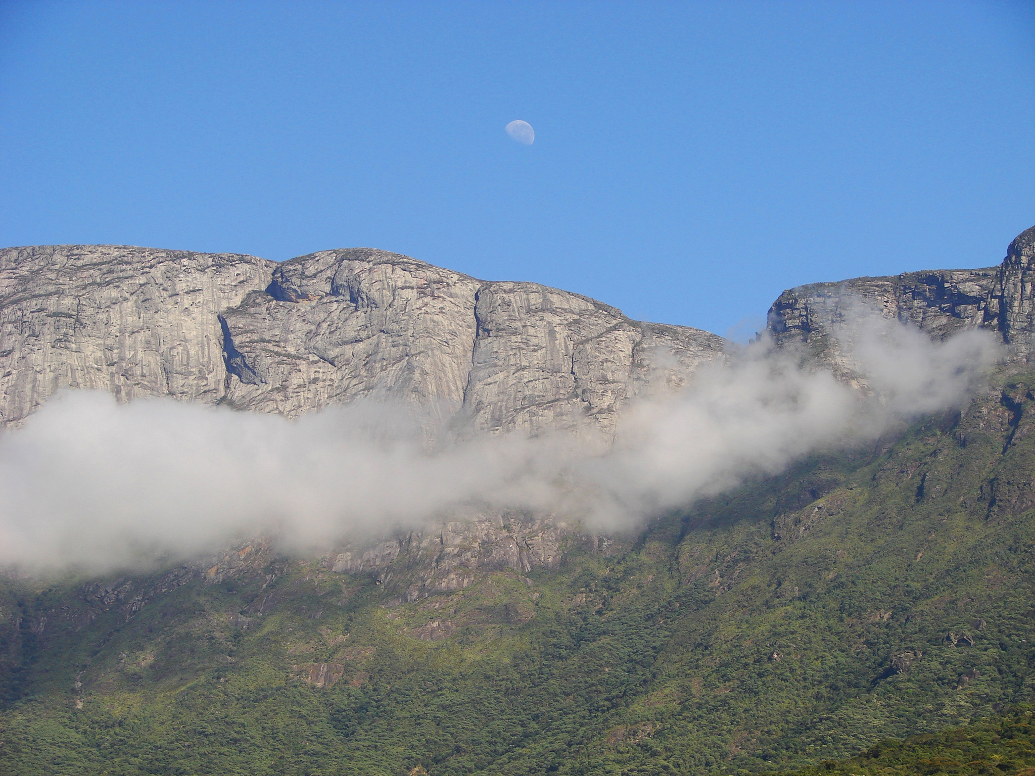 Vista da Serra do Caraça - Catas Altas/MG